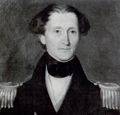 Retrato del comandante Philip Falkerson Voorhees